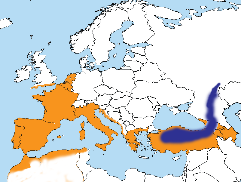 Verbreitungsgebiet von Cettia cetti